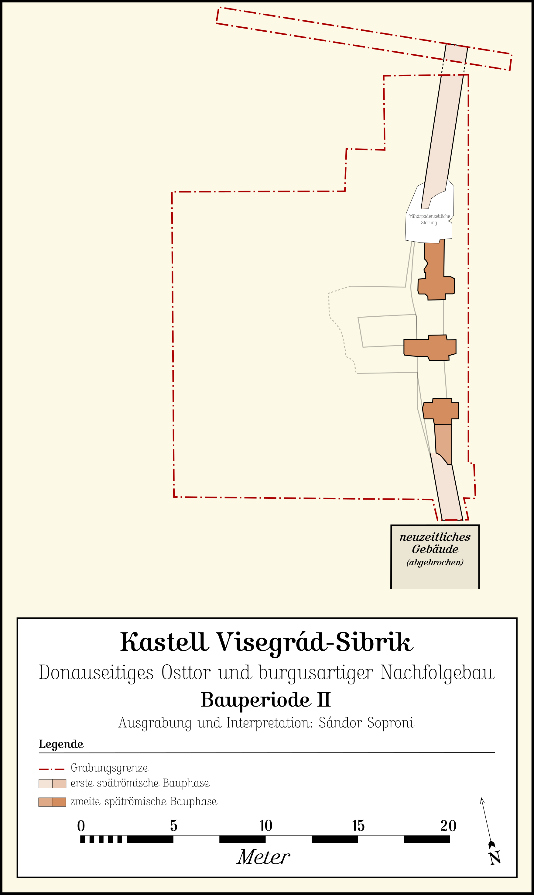 Kastell Visegrád–Sibrik, Ungarn: Zweite Bauphase, Osttor. Quelle: Zsolt Máté (Hrsg.): Frontiers of the Roman Empire – Ripa Pannonica in Hungary (RPH), Nomination Statement, Vol. 2, National Office of Cultural Heritage, Budapest 2011, S. 202.